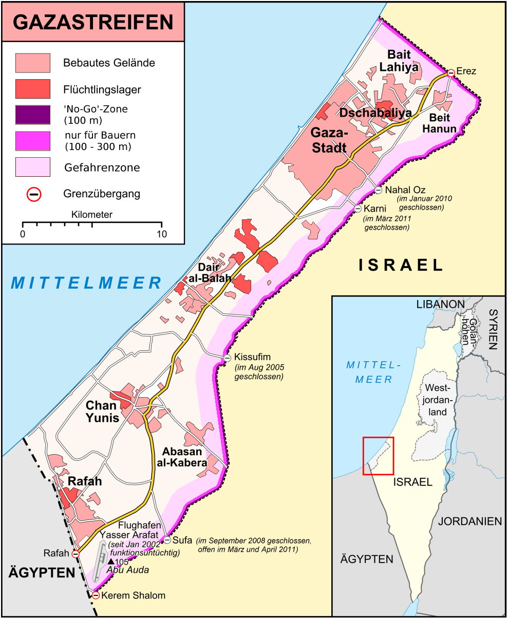 Karte des Gazastreifens nach UN-Angabe im Dezember 2012 / Januar 2013